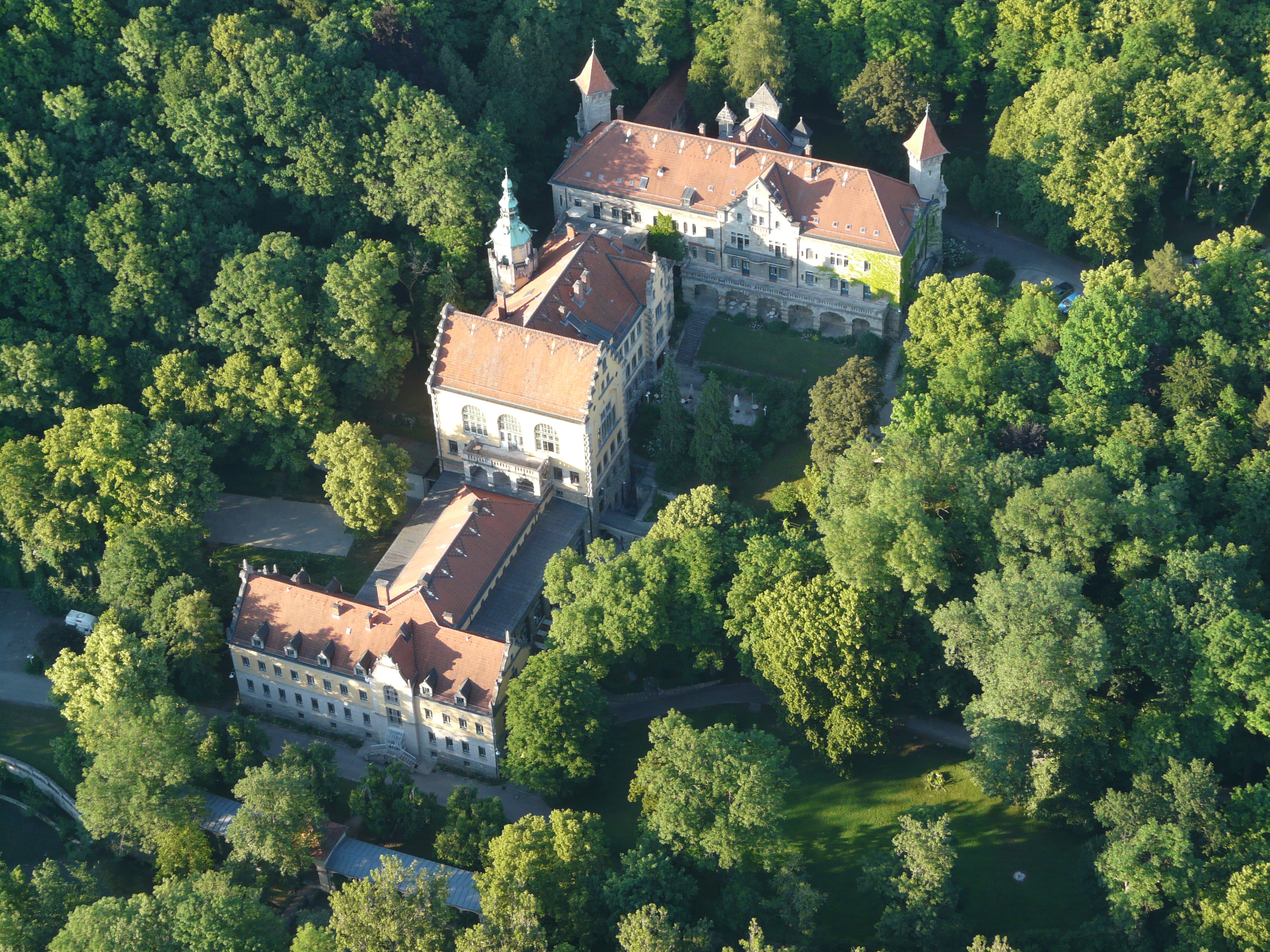 Luftbild des Wildbads bei Rothenburg ob der Tauber von Süden